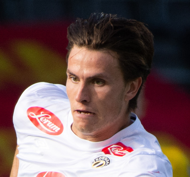 Frå kampen mellom Sogndal og Raufoss 31. juli 2020.